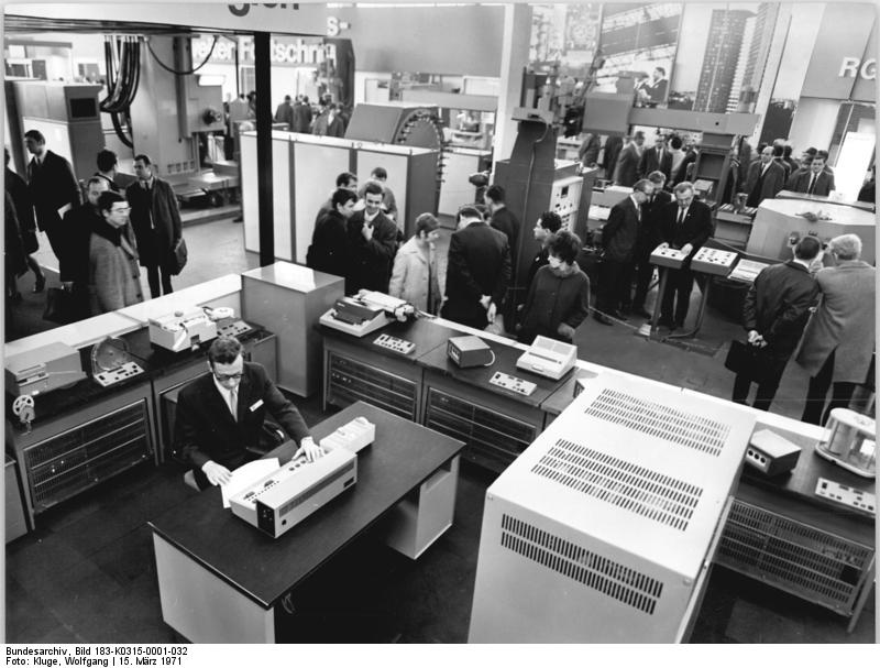 Leipzig, Frühjahrsmesse, Elektronische Datenverarbeitung Zentralbild Kluge 15.3.71 Leipziger Frühjahrsmesse 1971. In der Halle 20 demonstriert das Werkzeugmaschinen-Kombinat "Fritz Heckert" Karl-Marx-Stadt das Prinzip "DNC-Prisma", d.h. die direkte numerische Dateneingabe für WMW-NC-Werkzeugmaschinen vom Rechner. Der ökonomische Nutzen des Prinzips besteht in der Mehrfachausnutzung des Rechners und in der Steigerung der Auslastung der Werkzeugmaschinen. "DNC-Prisma" ist das Resultat wissenschaftlich-technischer Kooperation zwischen der DDR und der VR Polen. Im Vordergrund der polnische Rechner ODRA 1204, der direkt mit dem Maschinensystem M 250 NC (im Hintergrund) gekoppelt ist.